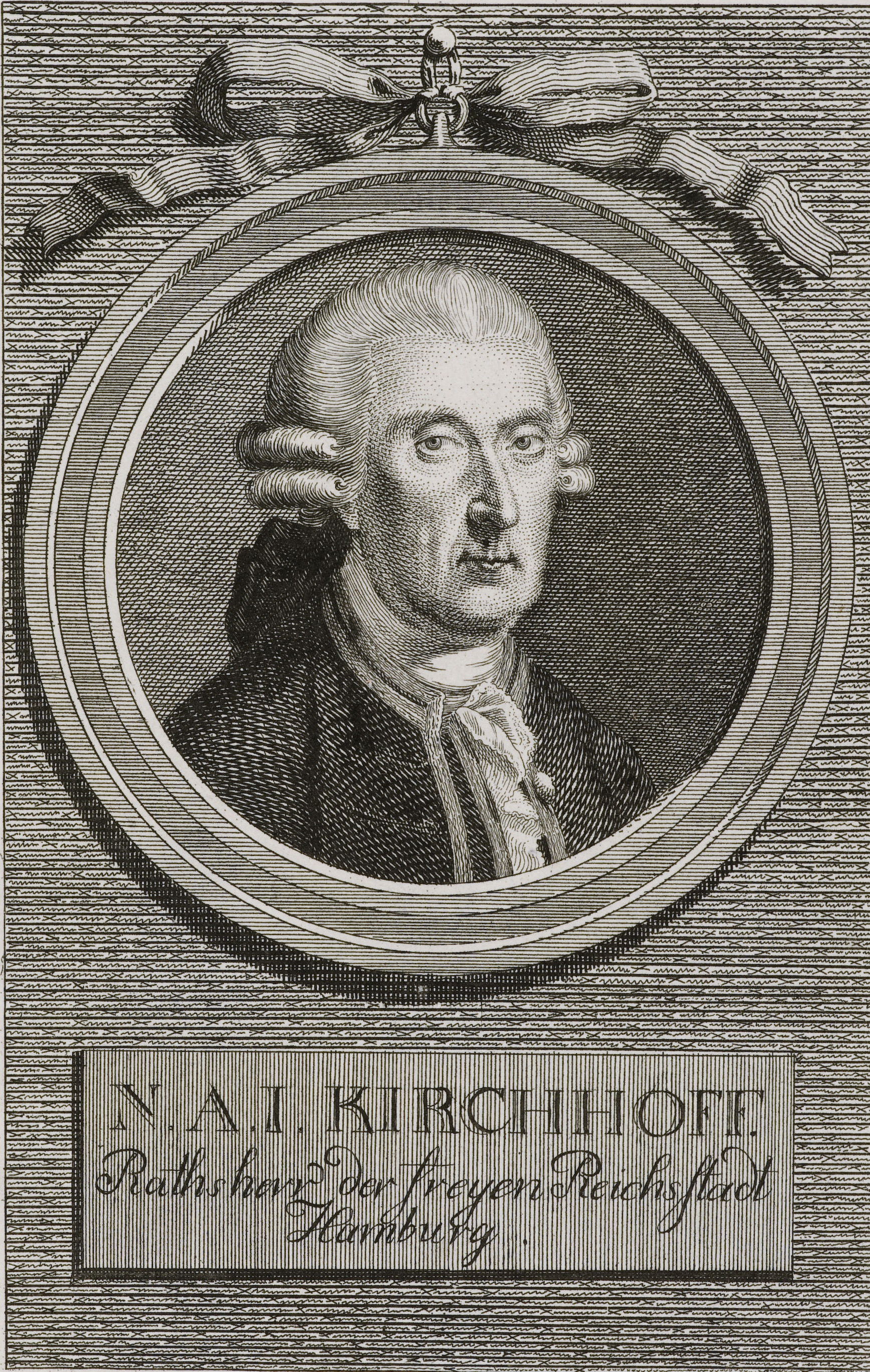 N. A. I. Kirchhof